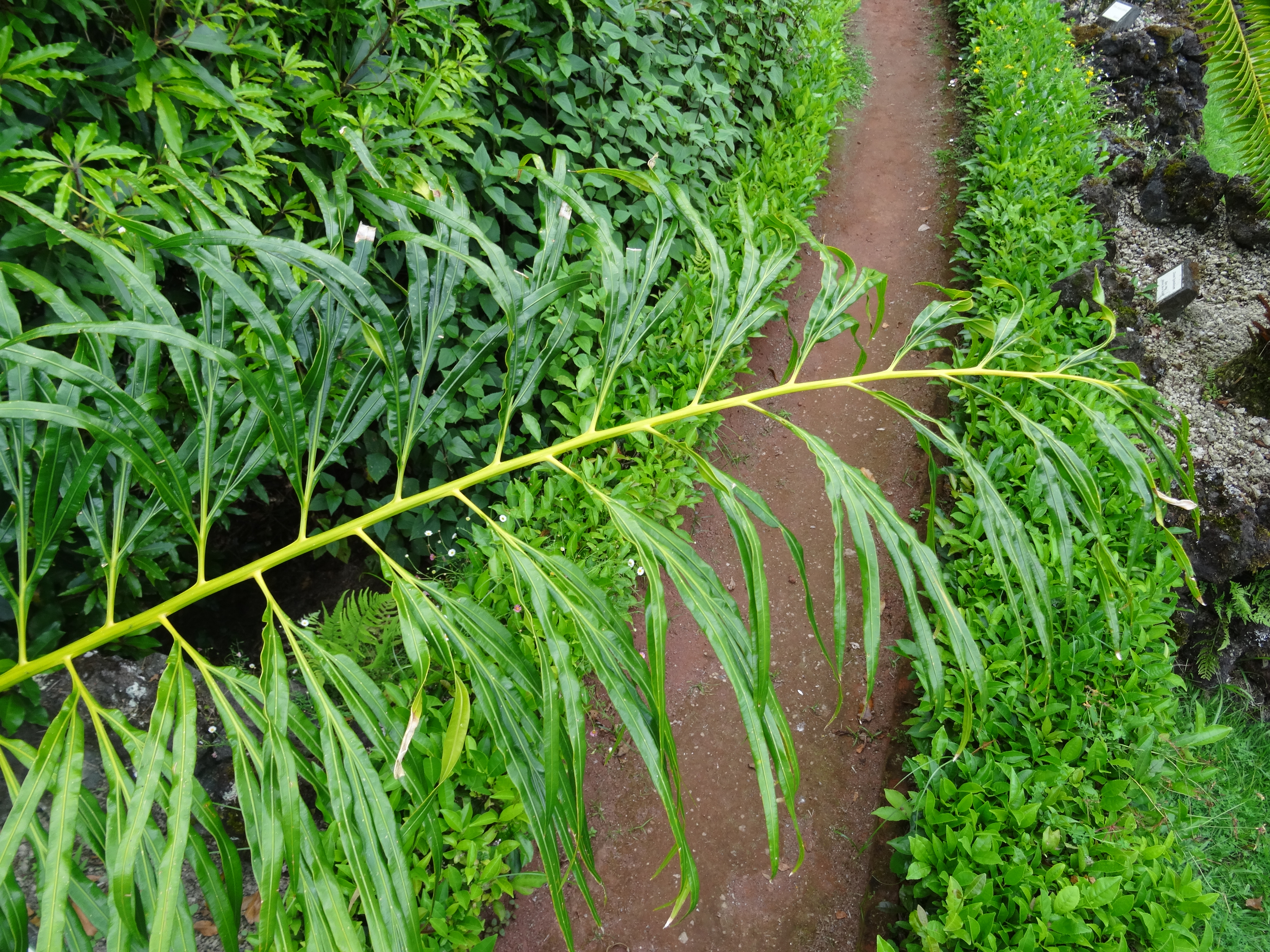 Cycas multipinnata, Parque Terra Nostra, Furnas, Azoren